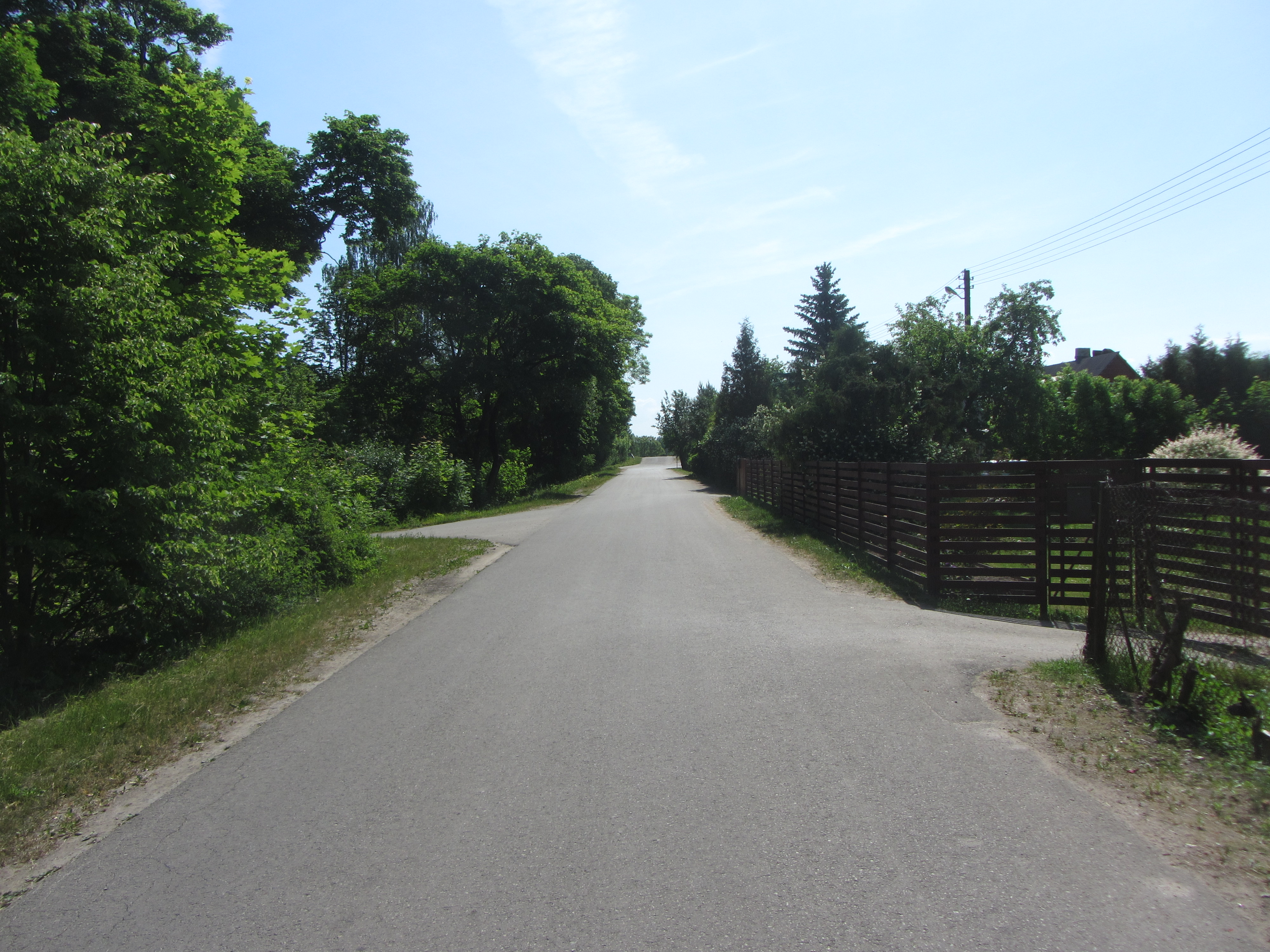 Pravieniškės I, Lithuania